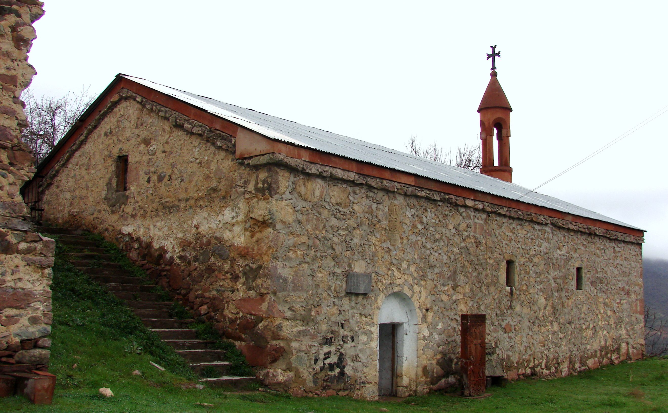 Ծավ գյուղի Սբ. Գևորգ եկեղեցի, 17-18 դդ, վե­րա­կառ. 1907 թ.